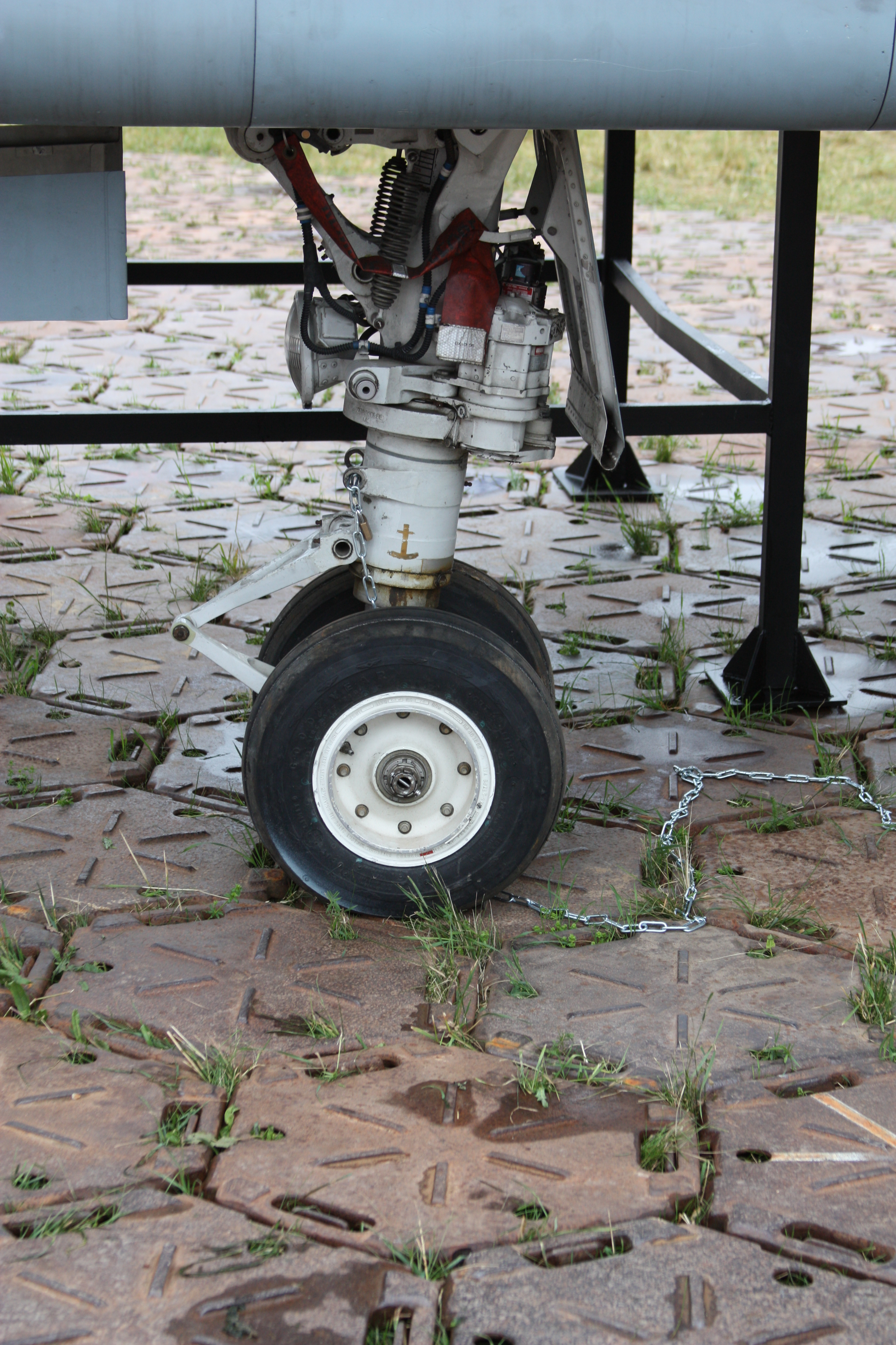 ILA 2010, am Samstag aufgenommen